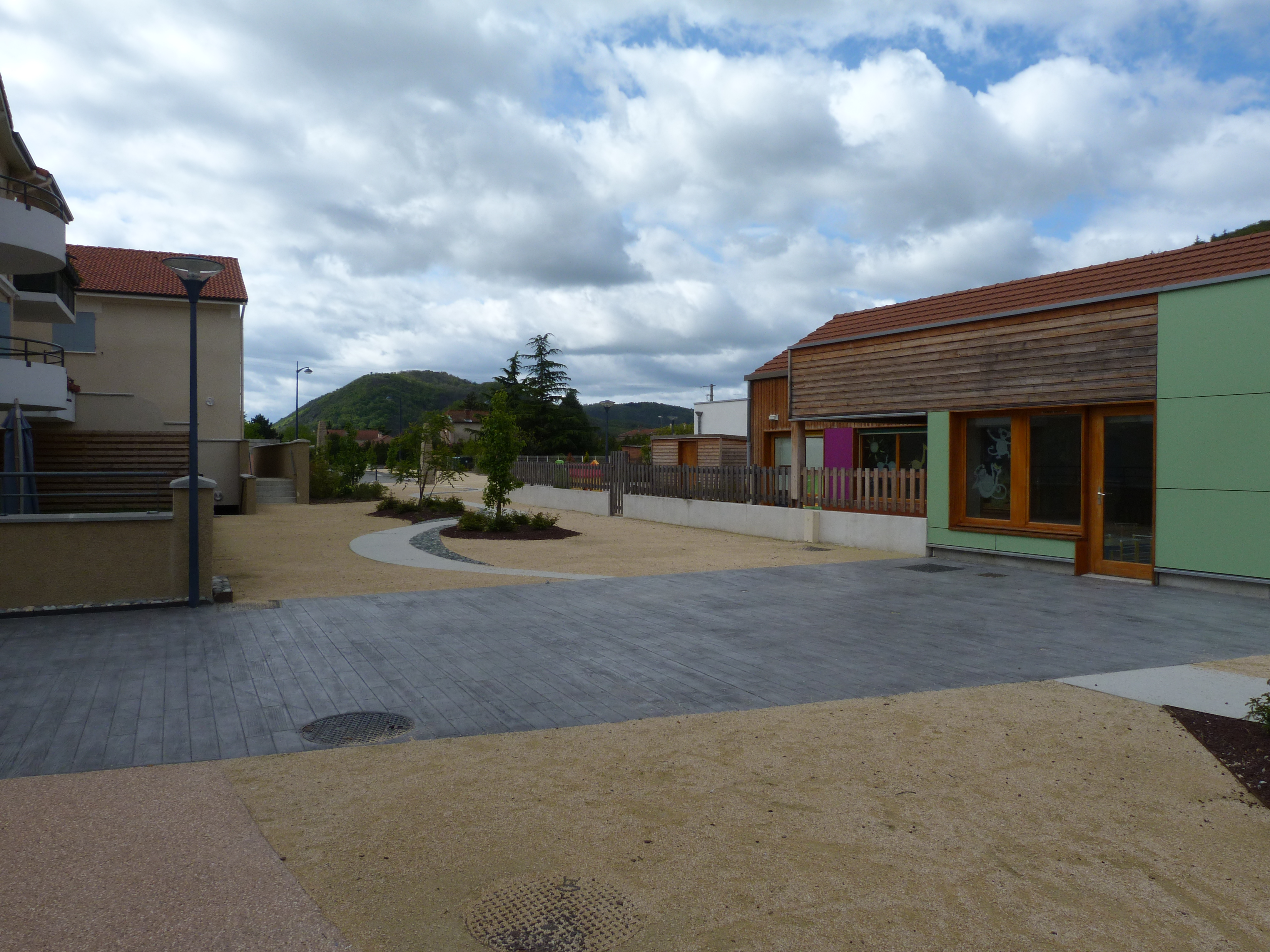 la place de la fontaine : son restaurant/bar/épicerie, sa crèche et son école autour de la fontaine. Point de départ des chemins de l'arborescence.